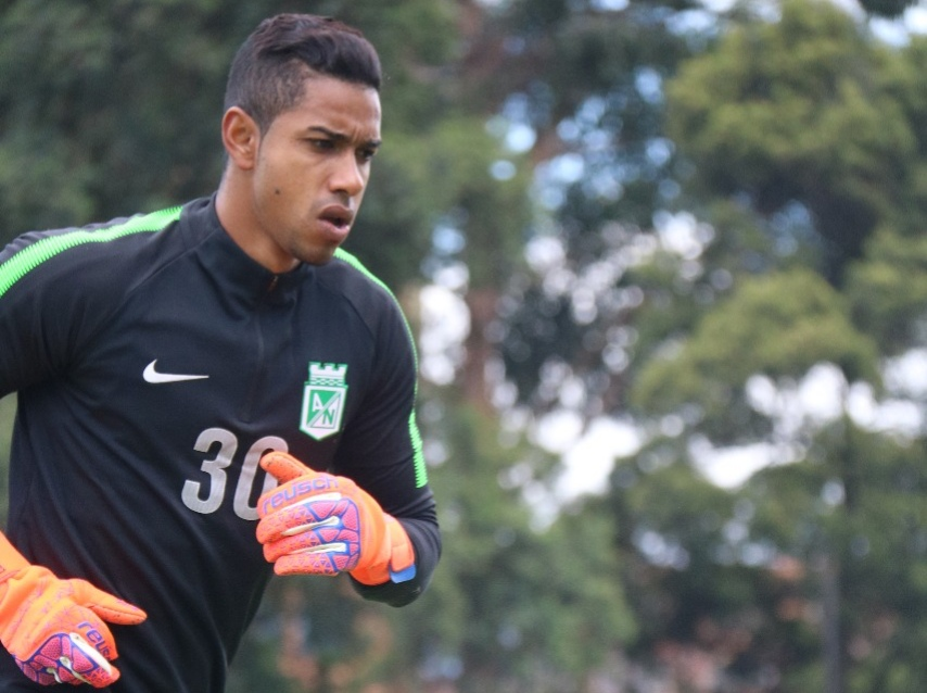 Jose Cuadrado Atlético Nacional